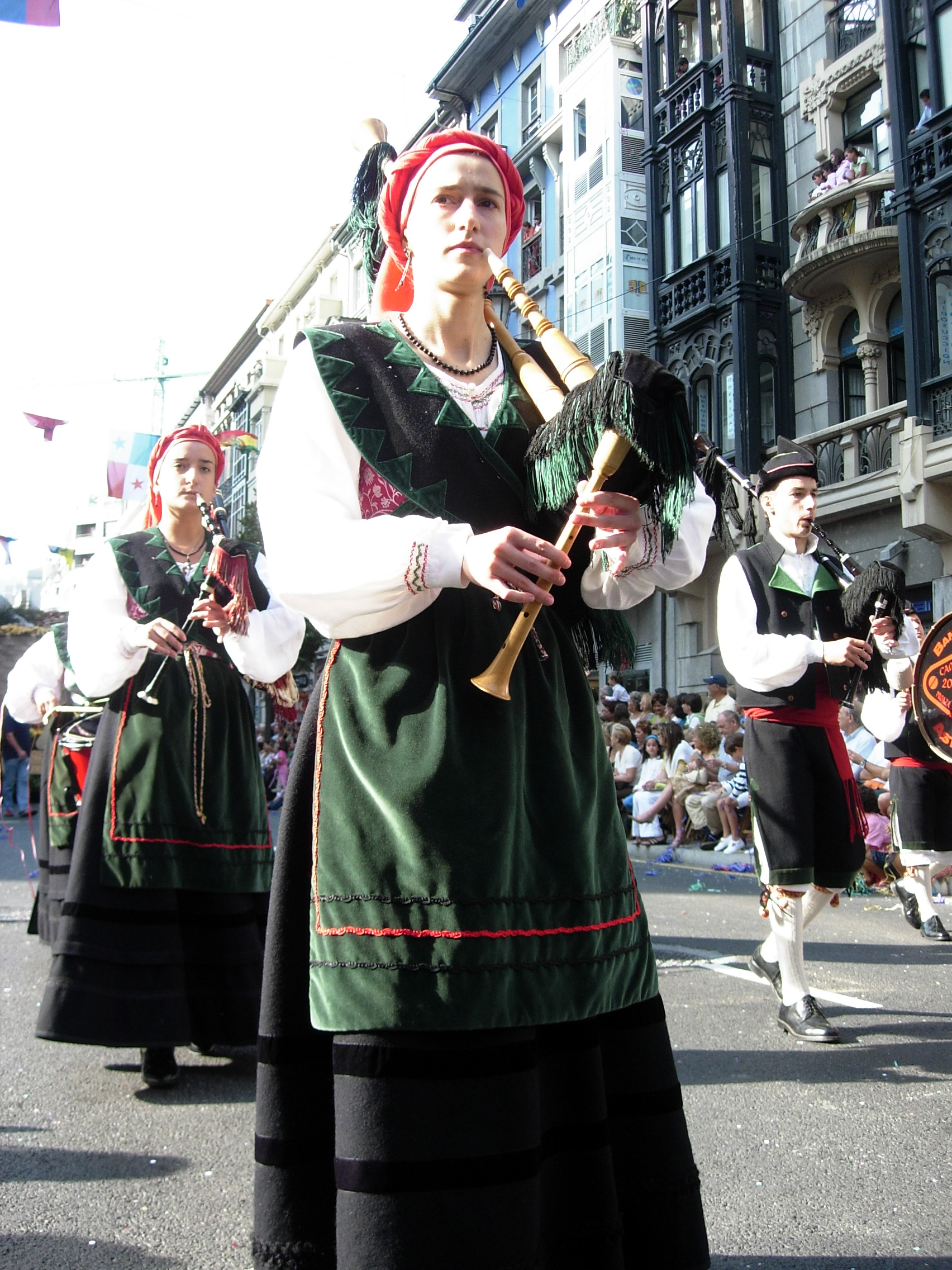 Y esta es sola una de los más de 300 gaiteros que actuarón en cinco bandas de gaitas distintas. La más espectacular de ellas estaba integrada por ocho grupos, entre ellas, la de Ciudad de Oviedo, Vetusta y Naranco.Al son de la gaita